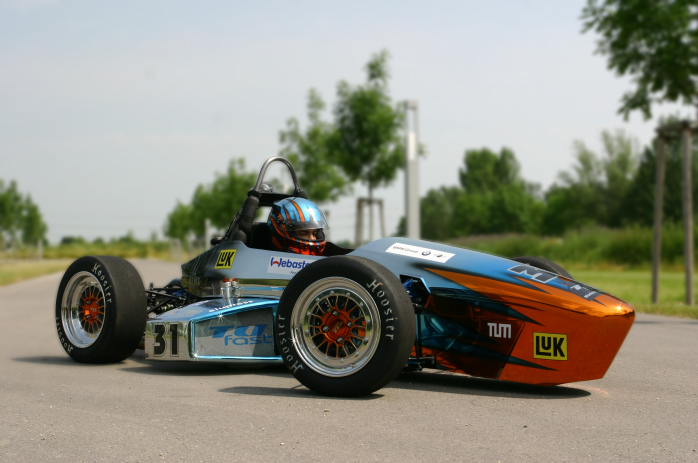 nb05